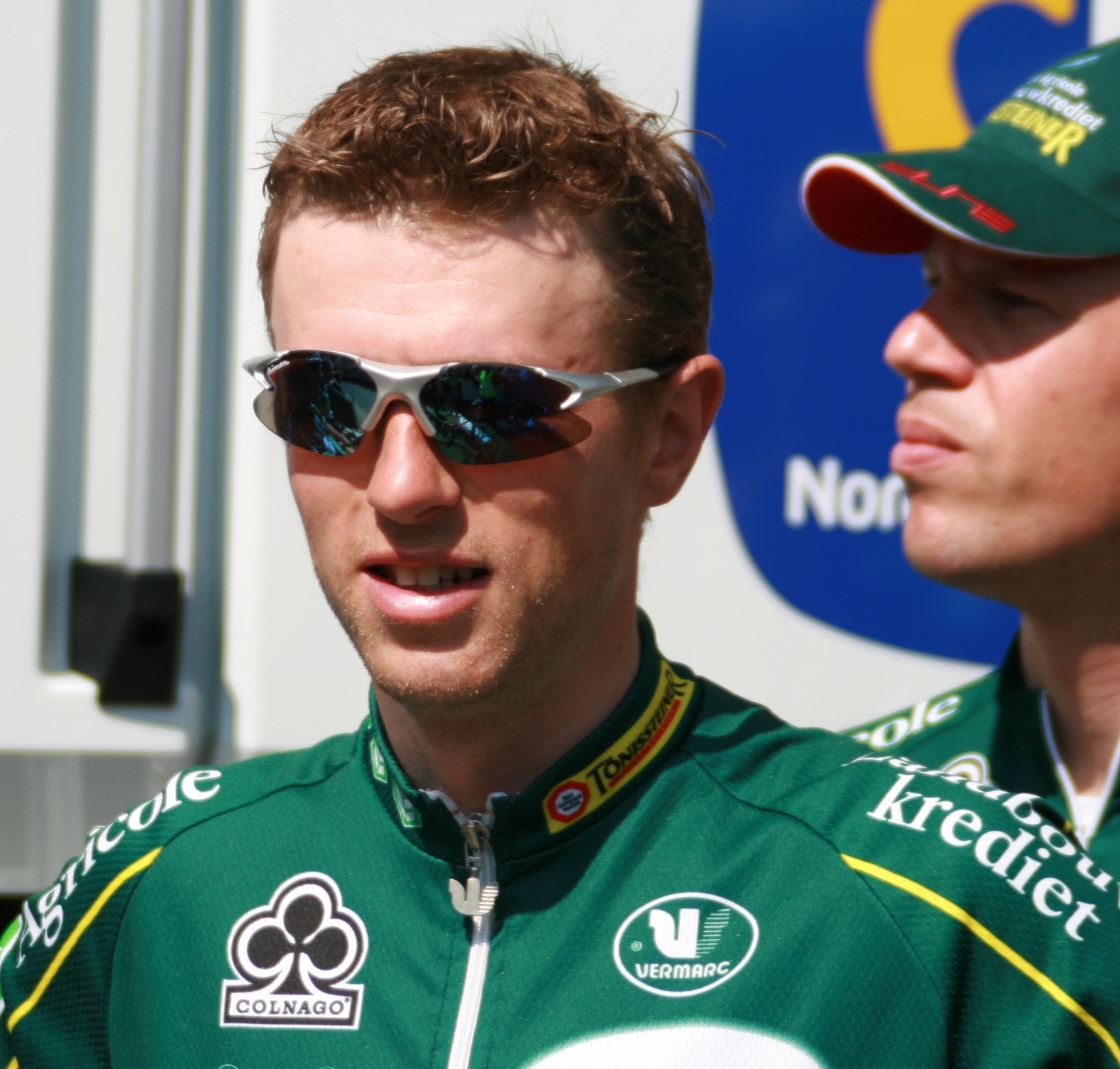 Bert Scheirlinckx aux Quatre jours de Dunkerque 2008